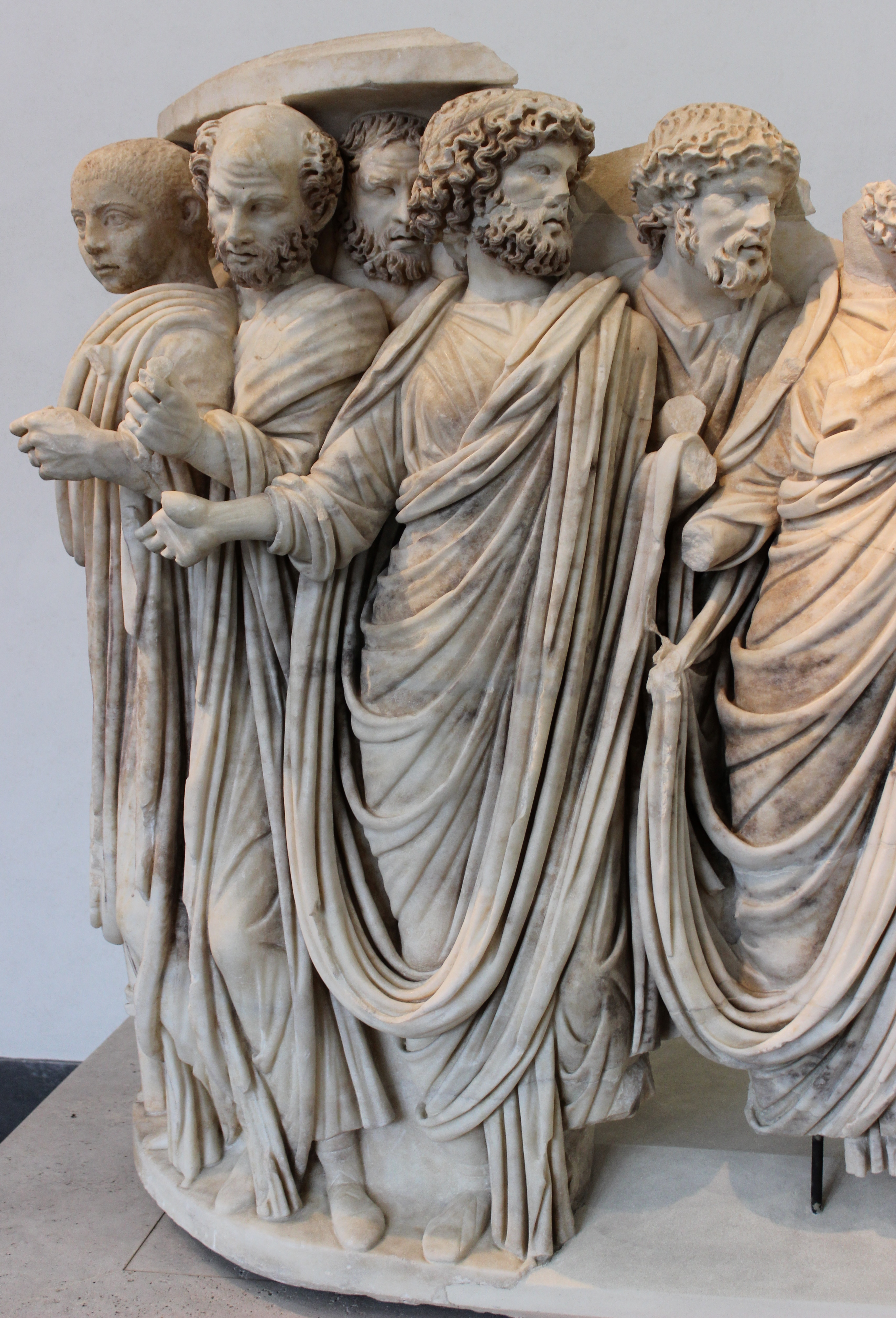 Roma. Museo del Palazzo Massimo alle Terme. Sarcófago de Acilia.